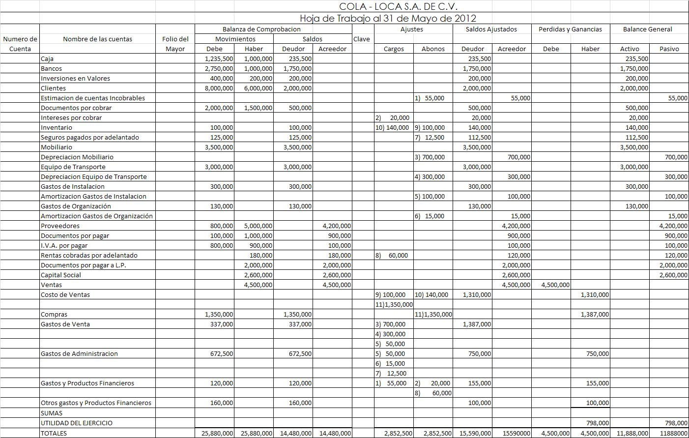 En esta imagen se muestra, un ejemplo de la imagen de trabajo con sus características correspondientes, y el formato adecuado.